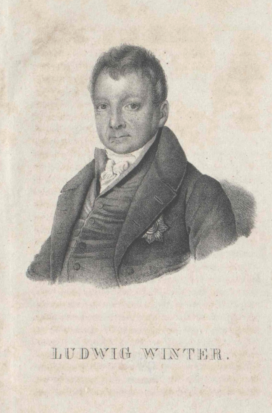 Ludwig Winter (1778–1839)